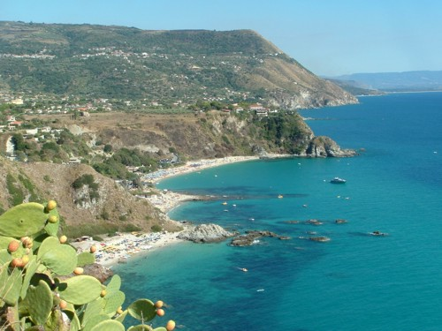 Spiaggia di Grotticelle.